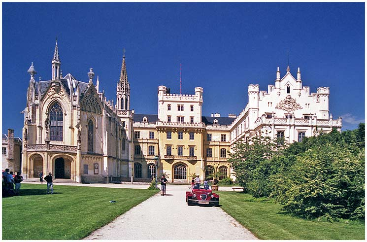 Zámek Lednice. Autor: Zp